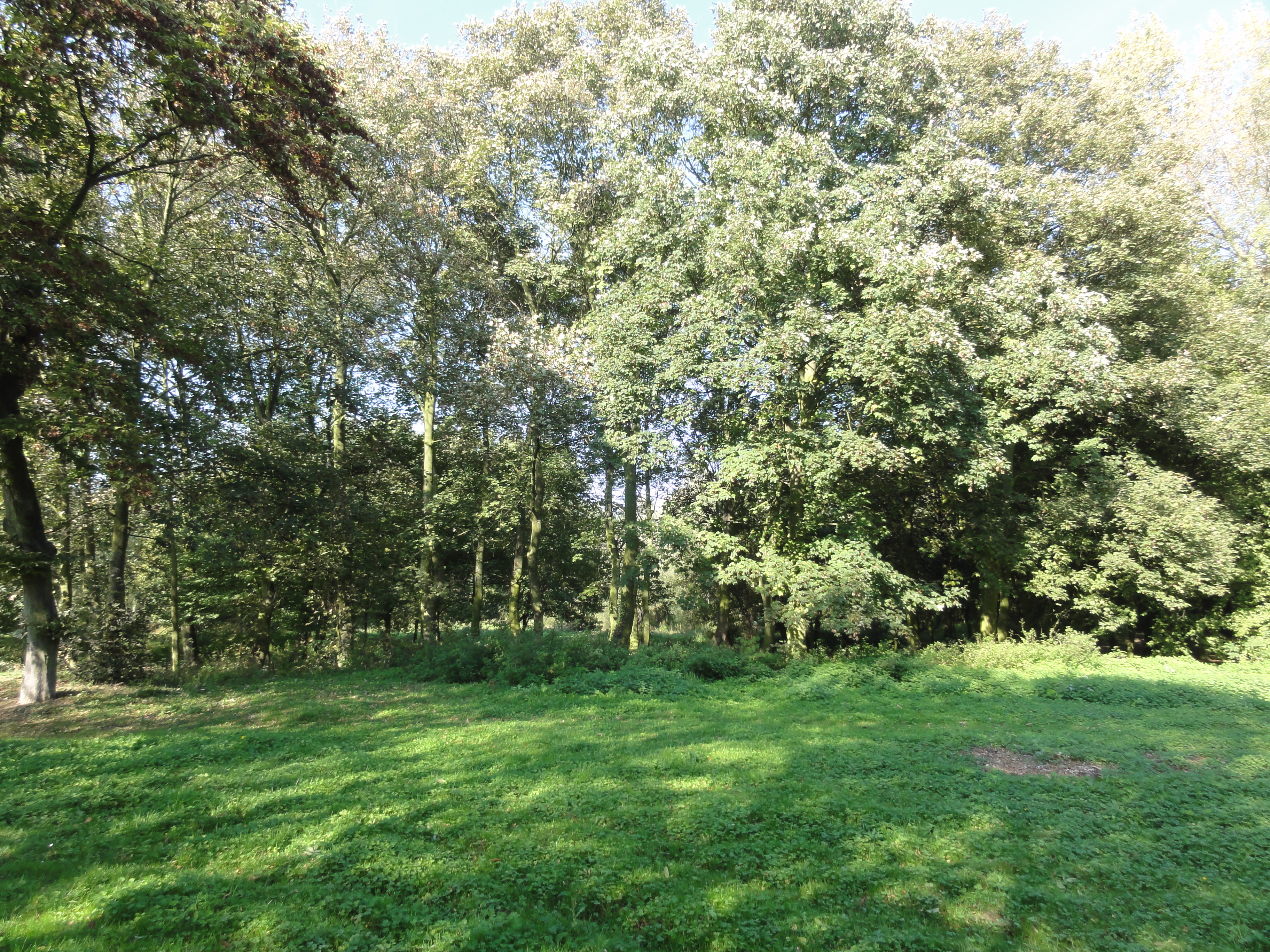 Terril n° 112 dit 5 d'Oignies, disparu, Fosse n° 5 de la Compagnie des mines d'Ostricourt, Libercourt, Pas-de-Calais, Nord-Pas-de-Calais, France.